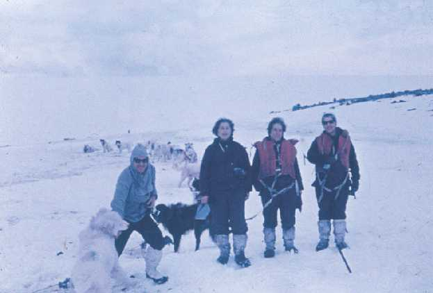 Irene Bernasconi. Viaje a Antartida 1968. Primeras investigadoras mujeres en Antartida. Base Esperanza. Antartida Argentina.